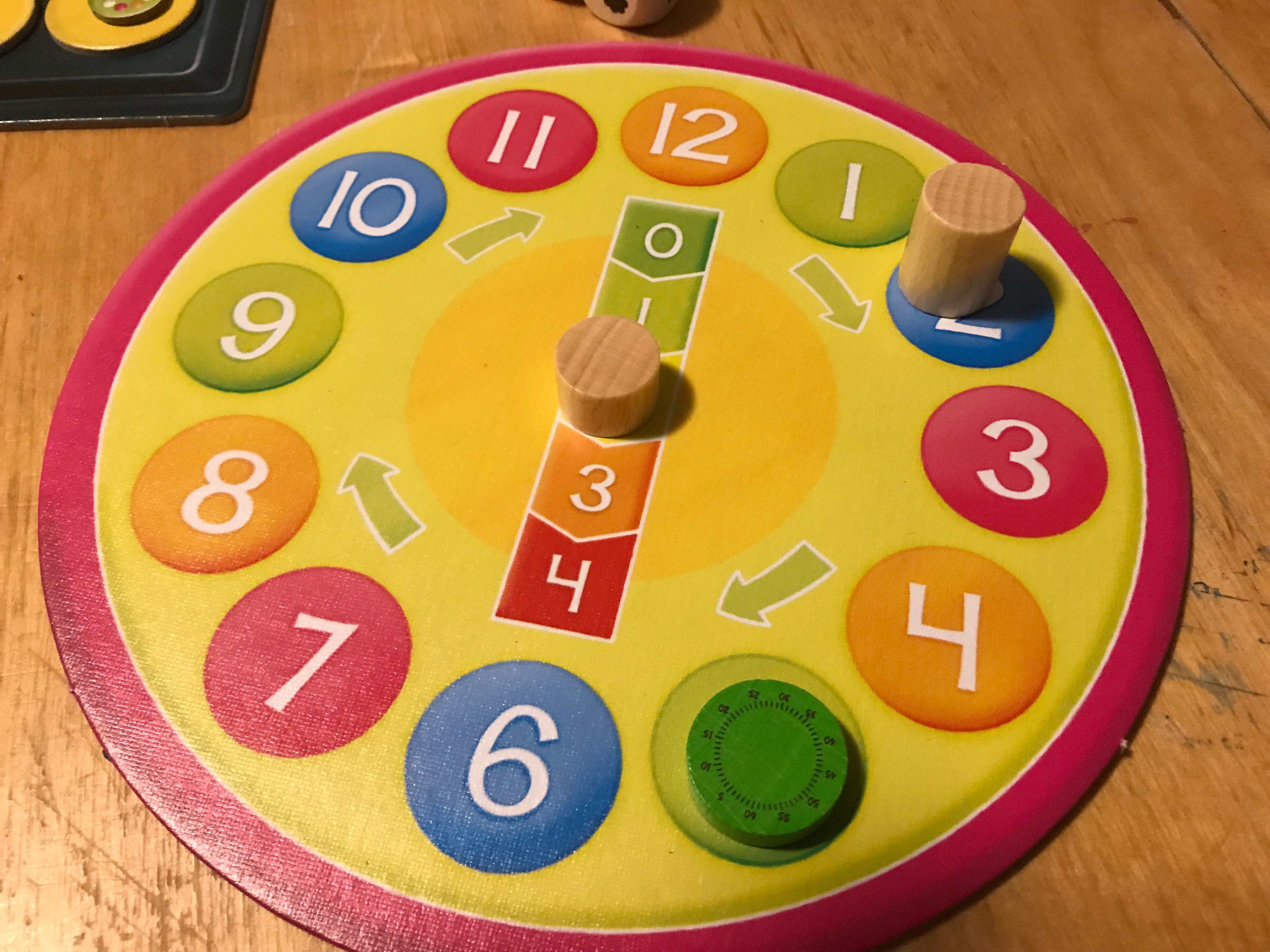 Spielmaterial des Spiels Cookies